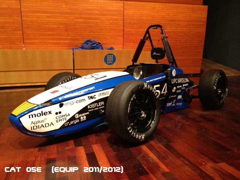 fotografia realizada durante la presentación del coche CAT05e en la sala de actos de la universidad ETSEIB